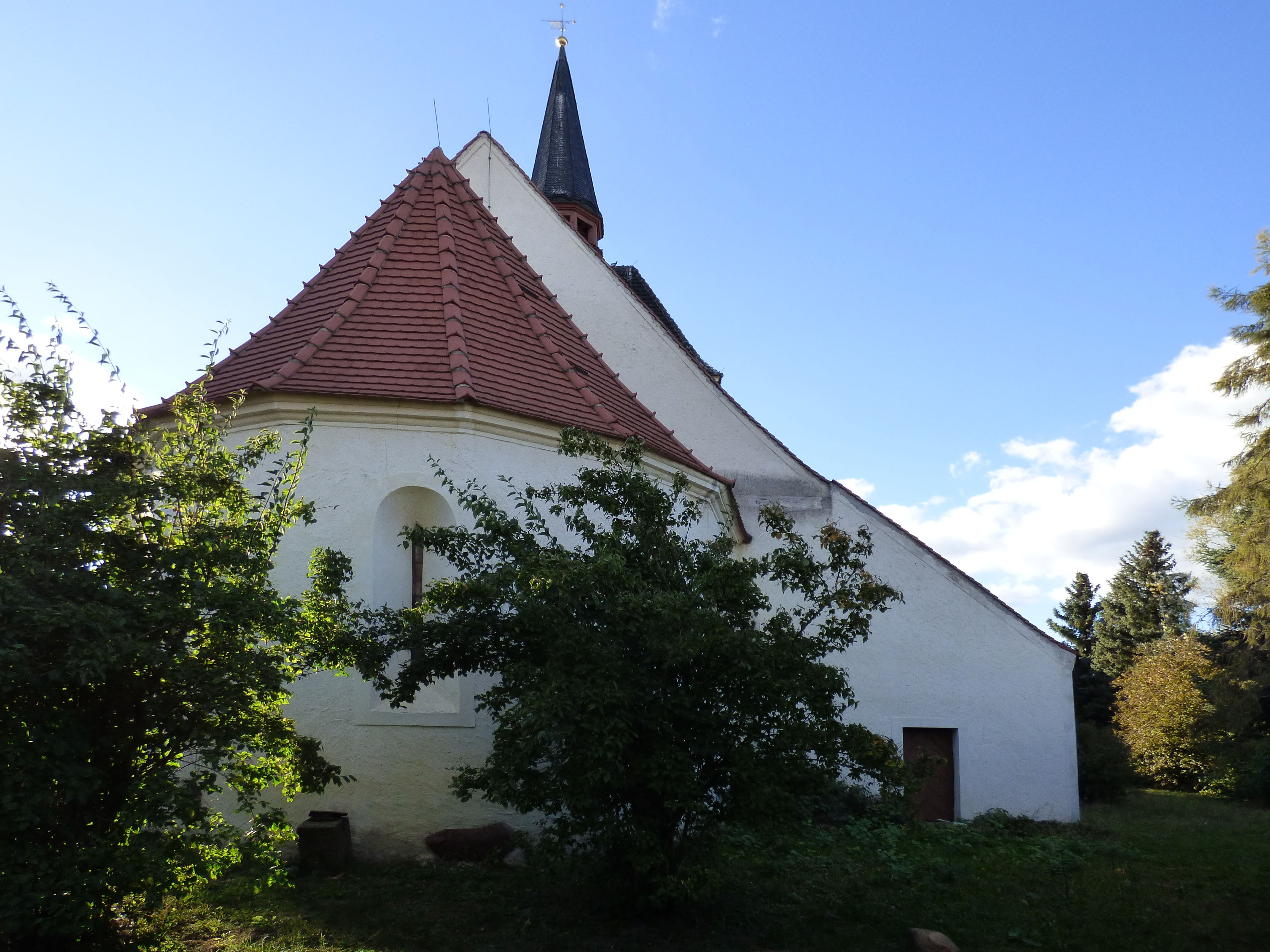 Ostseite der Dorfkirche Hohenleipisch